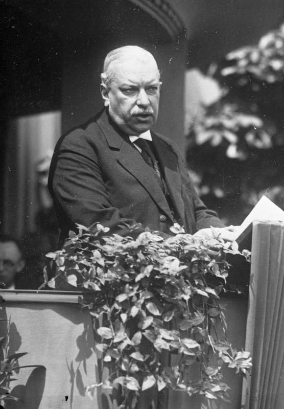 Der neue Reichs-Finanzminister Dr. Dietrich ! Der neue Reichs-Finanzminister Dr. Dietrich, dessen Ernennung durch den Reichspräsidenten von Hindenburg bestätigt wurde.